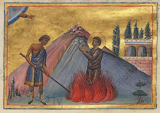 Преподобная Евфросиния Александрийская Константинополь. 985 г. Миниатюра Минология Василия II. Ватиканская библиотека. Рим.